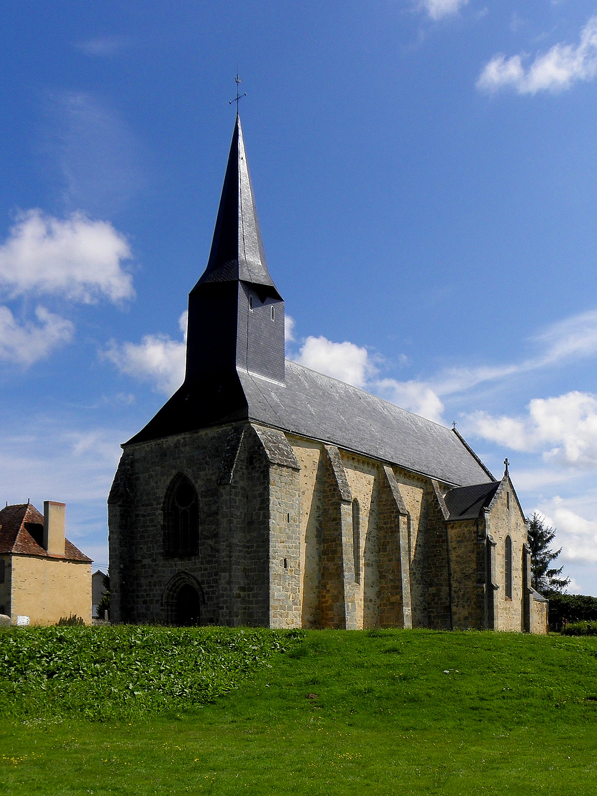 Église Saint-Martin de Parnac (36). Façade occidentale et flanc sud.